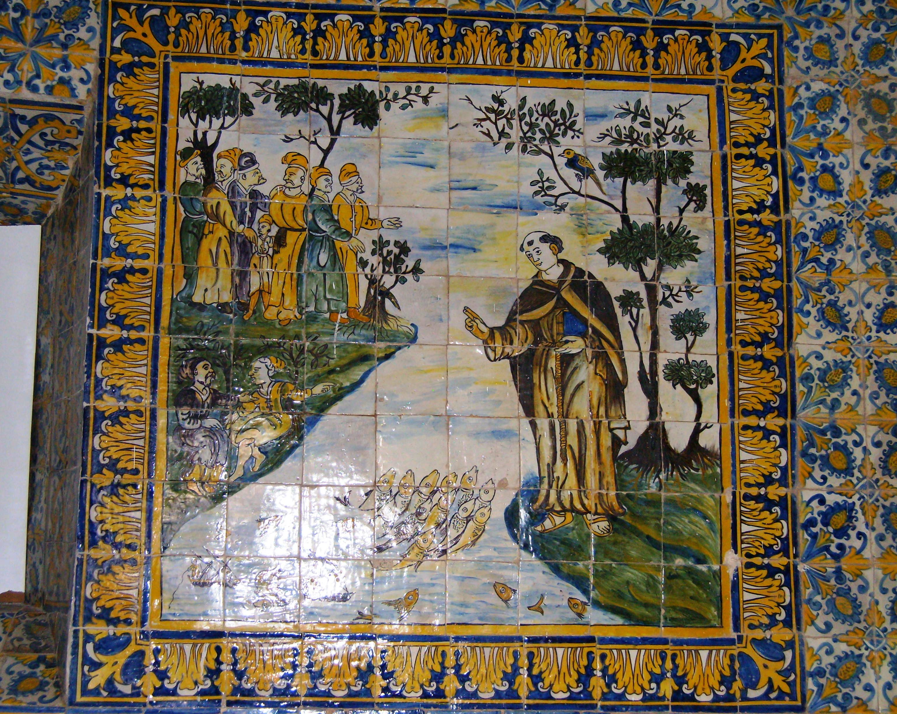 Igreja de Nossa Senhora da Vitória, ilha de Santa Maria, Açores: painel de azulejos (século XVII) na capela de Santo António, representando o Sermão daquele santo aos peixes.